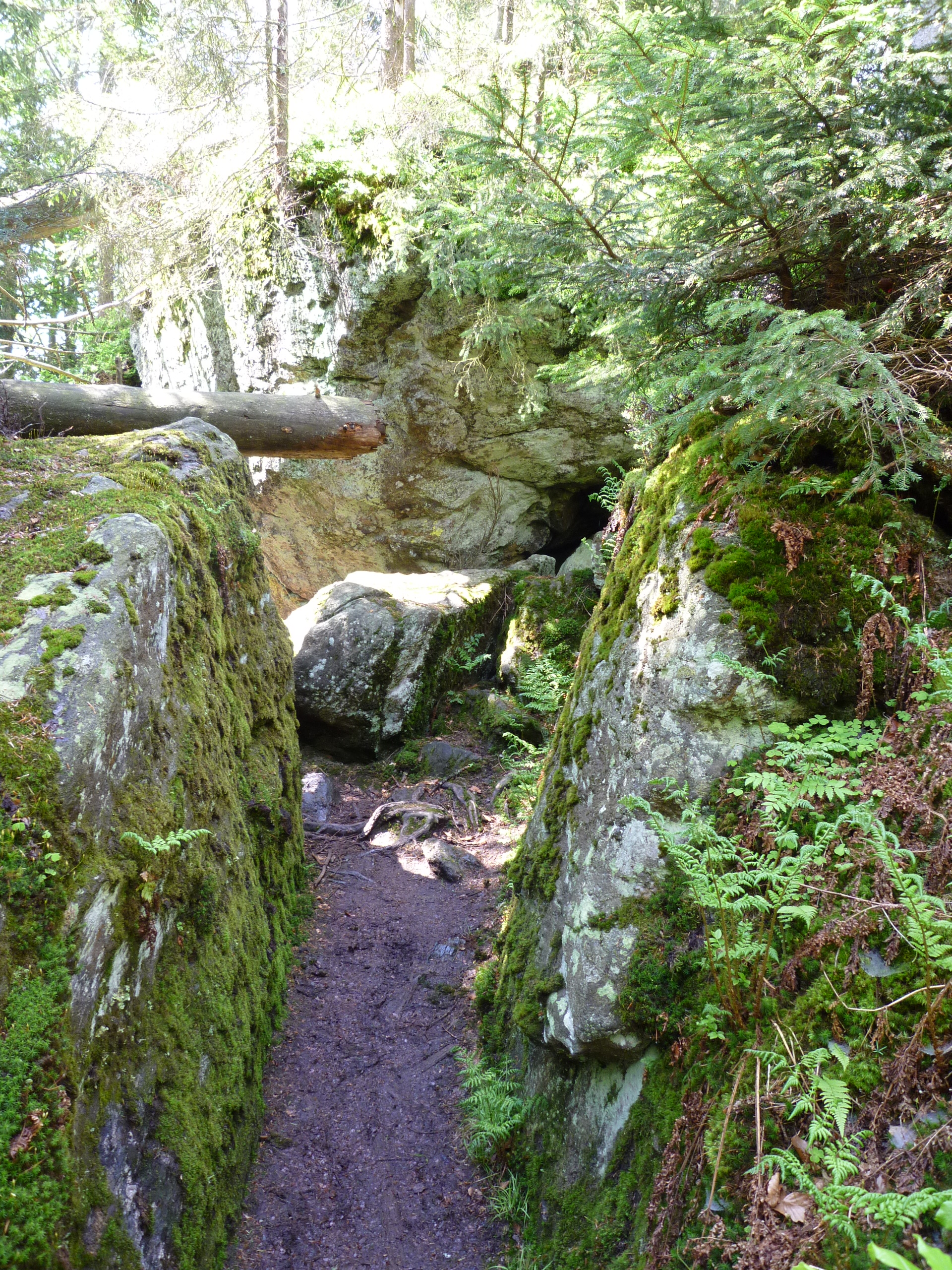 Wanderweg durch das Felsenwandergebiet im Nationalpark Bayerischer Wald, westlich der Ortschaft Mauth.